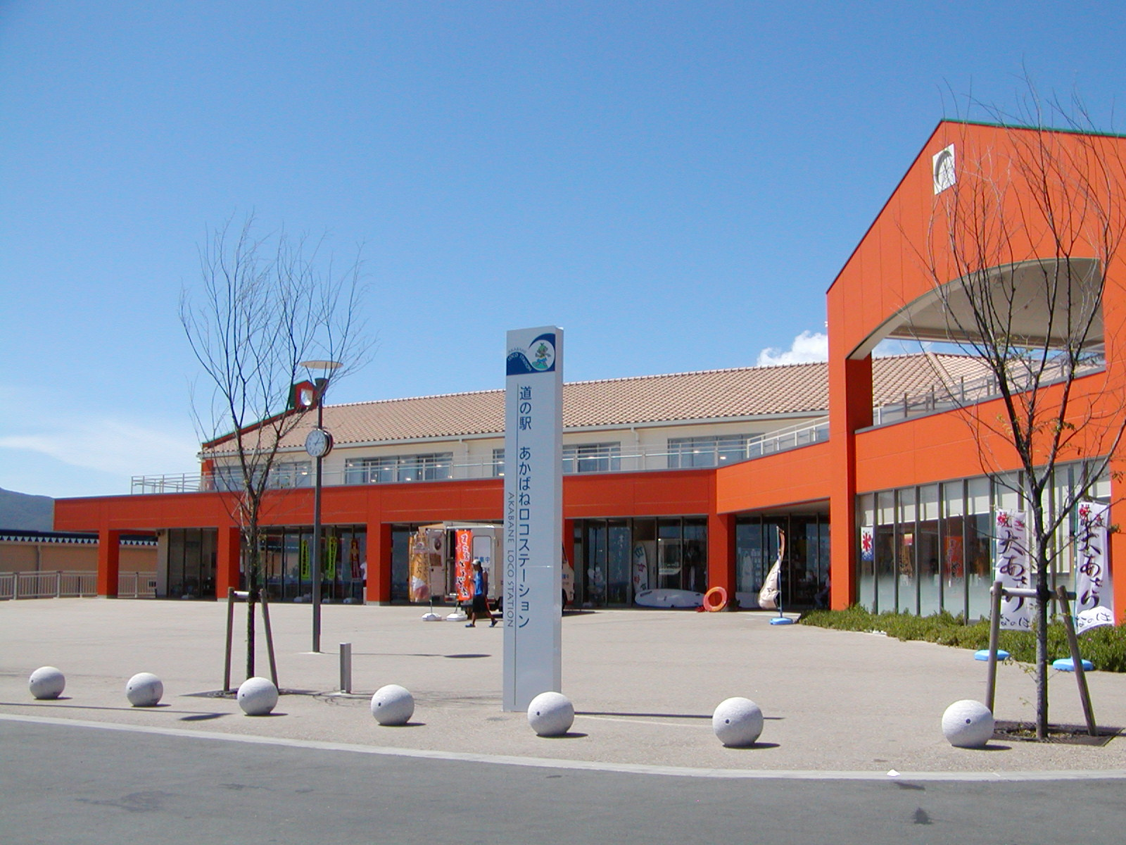 道の駅あかばねロコステーション（愛知県田原市）